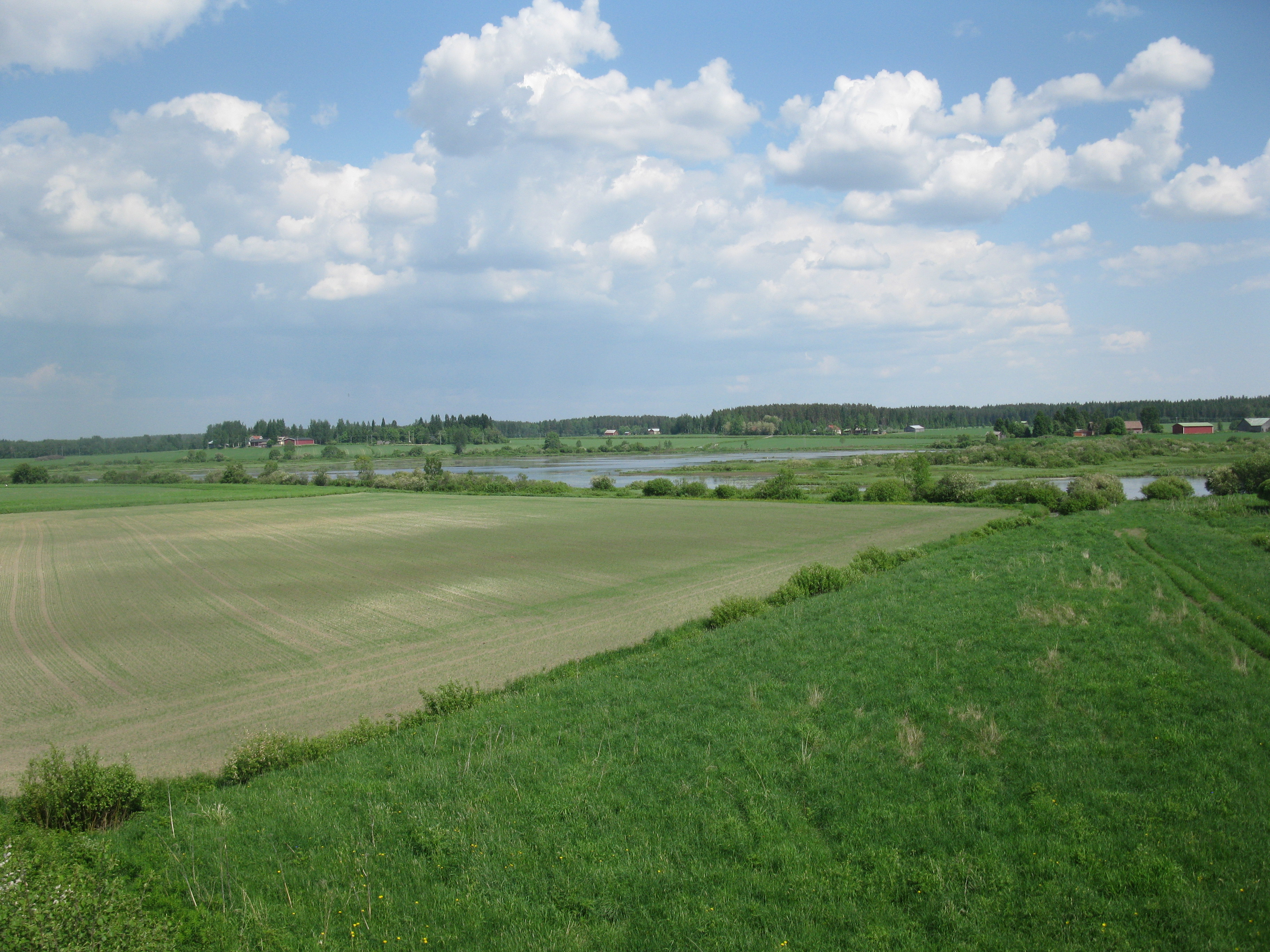 Kyynärjärvi Kankaanpäässä Satakunnassa nähtynä lintutornista lounaassa.